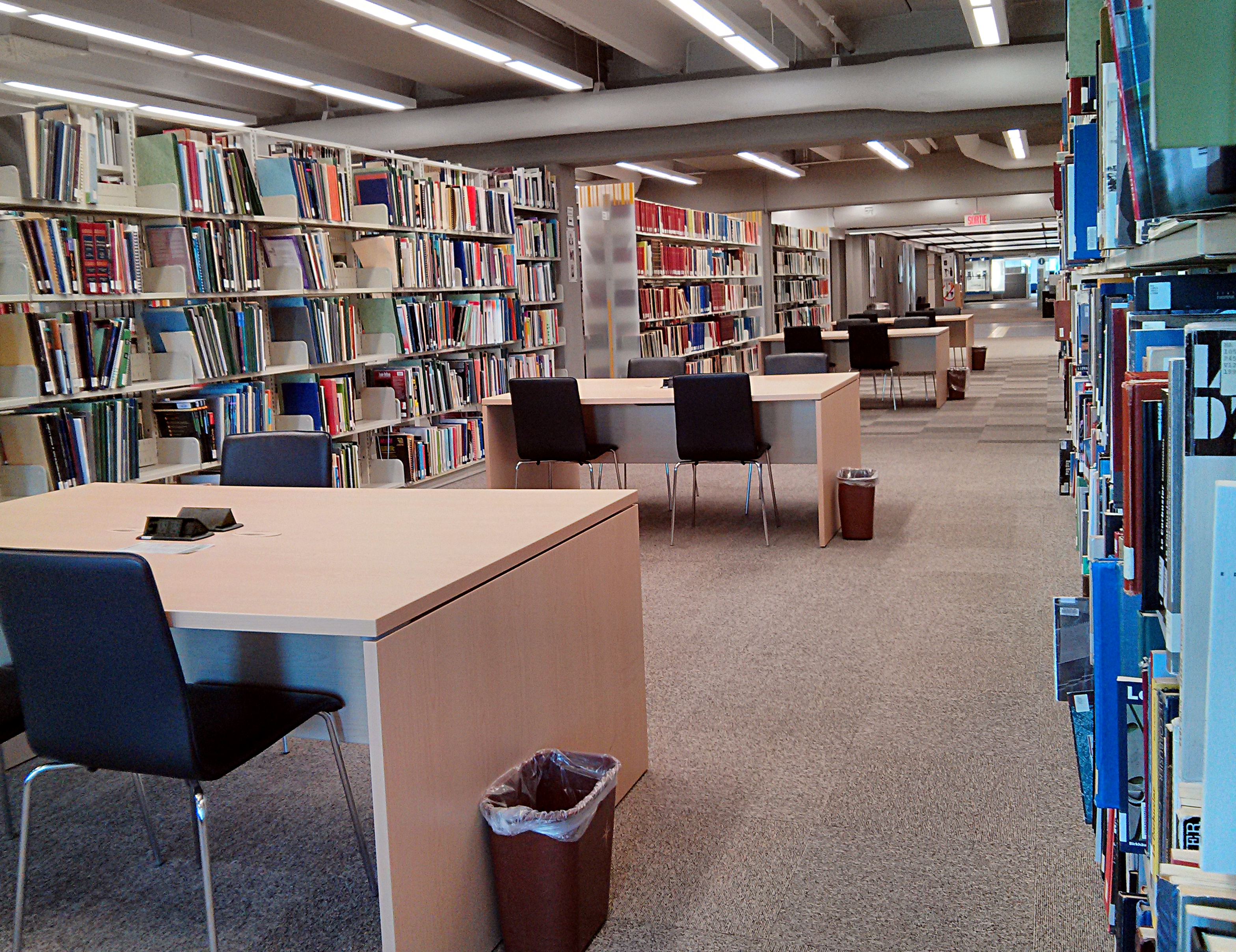 Quatrième étage de la Bibliothèque au Pavillon Jean-Charles-Bonenfant, Université Laval